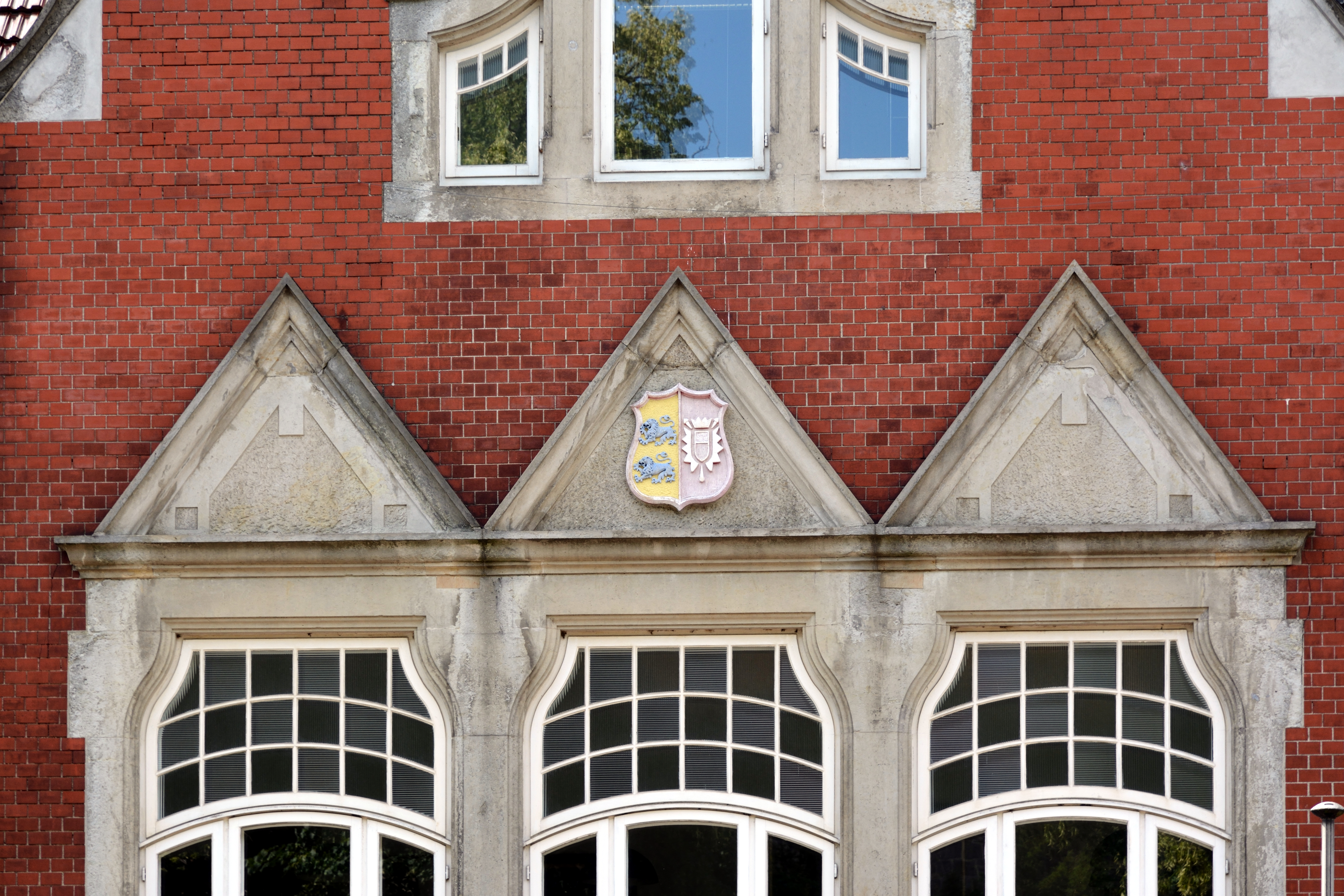 Das Wappen von Schleswig-Holstein am Rathaus von Kellinghusen. Die Löwen schauen in die falsche Richtung.